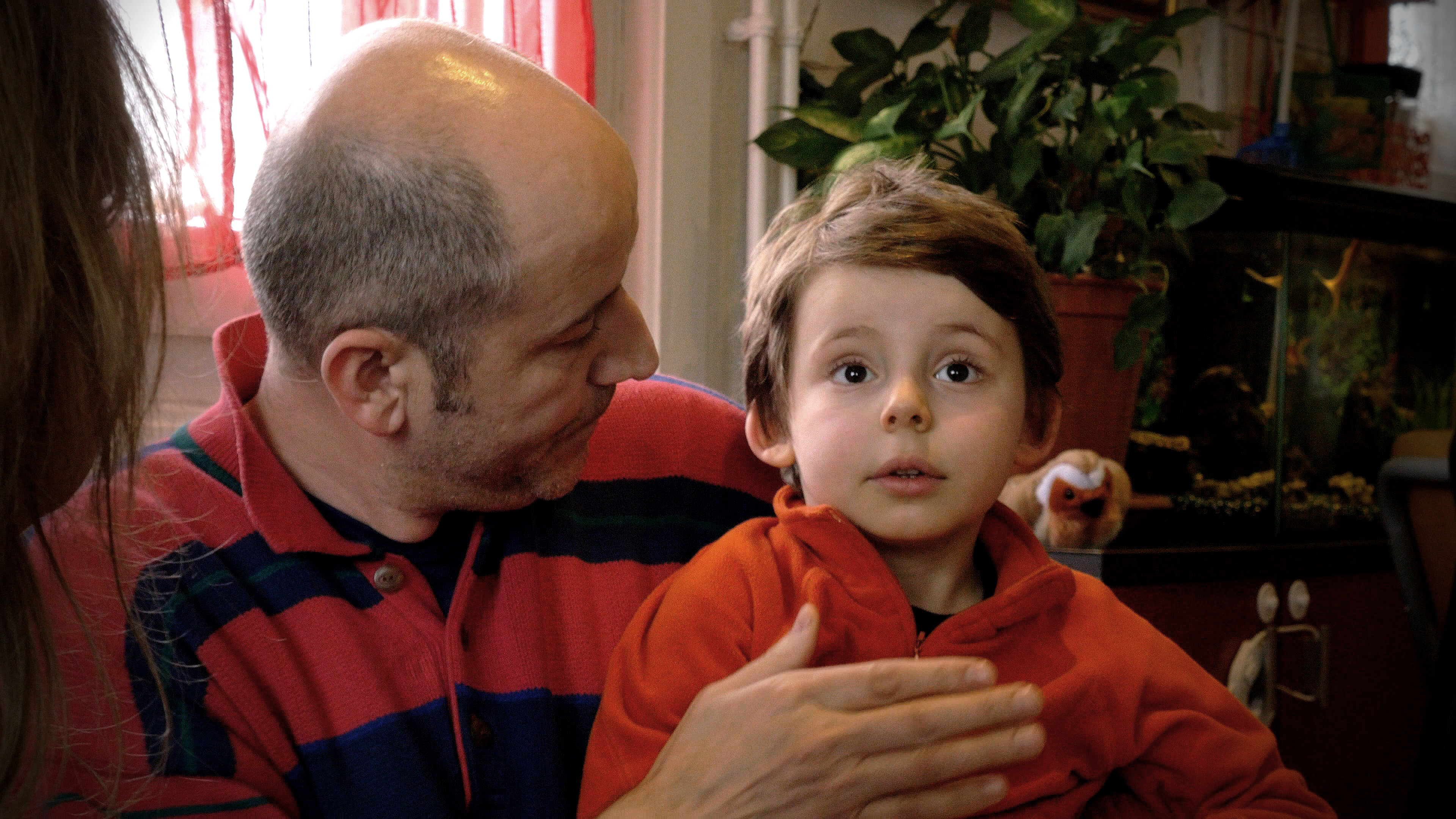 Louis et son papa Fatmir.Image du film de Fernand Melgar " À l'école des Philosophes"